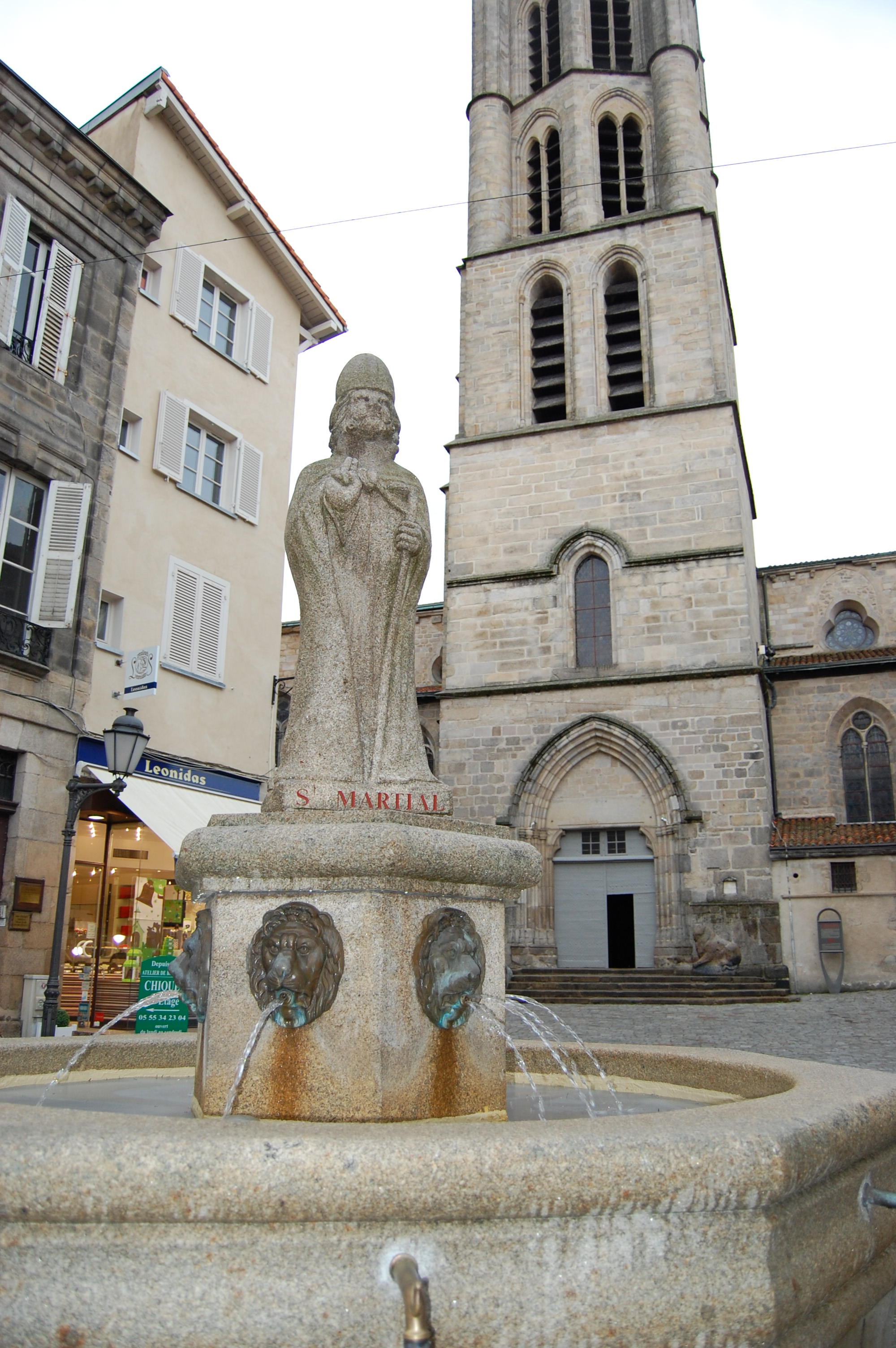 Statue de saint Martial sur fontaine devant église Saint-Michel des Lions à Limoges